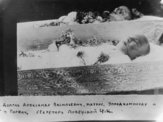 Похороны большевиков - жертв Ливенского восстания (август 1918)